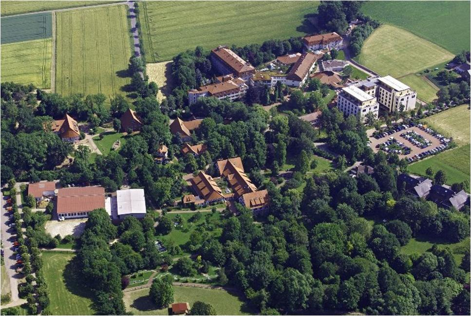 Luftbild der Klinik Bad Oexen, Juni 2010